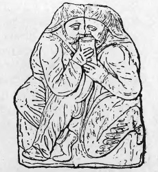 Скитські побратими (золота бляшка з Кульобської могили).